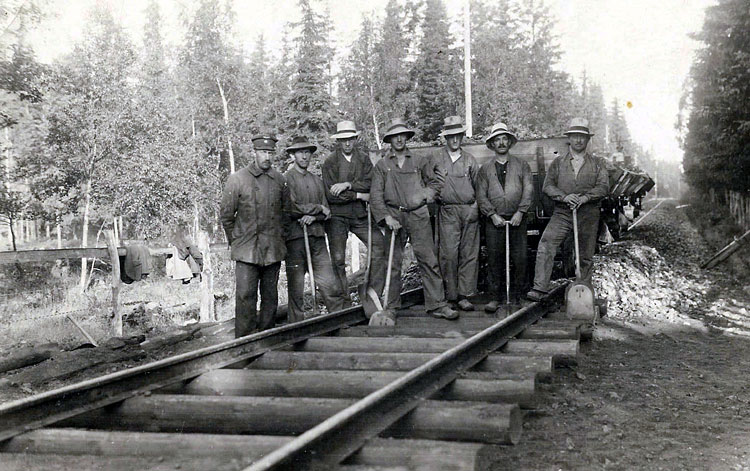 Navvies during work at Nybro-Sävsjöströms Järnväg in Sweden. Standing far right is Oskar Lindahl from Mackamåla outside Målerås.